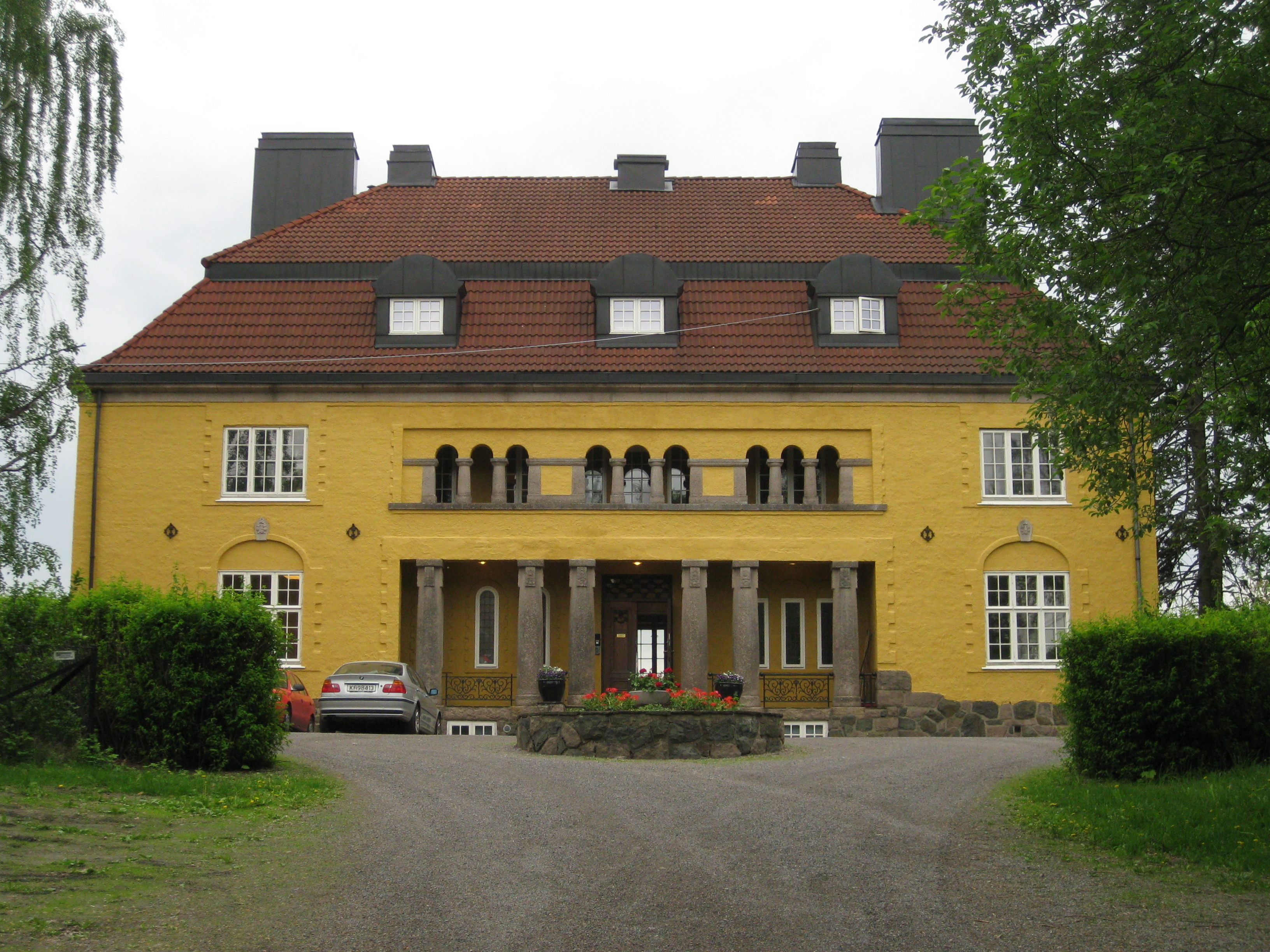 Fredriksborgsveien 18 - Bygdøy, Oslo. Oppført 1918, arkitekter Carl og Jørgen Berner.